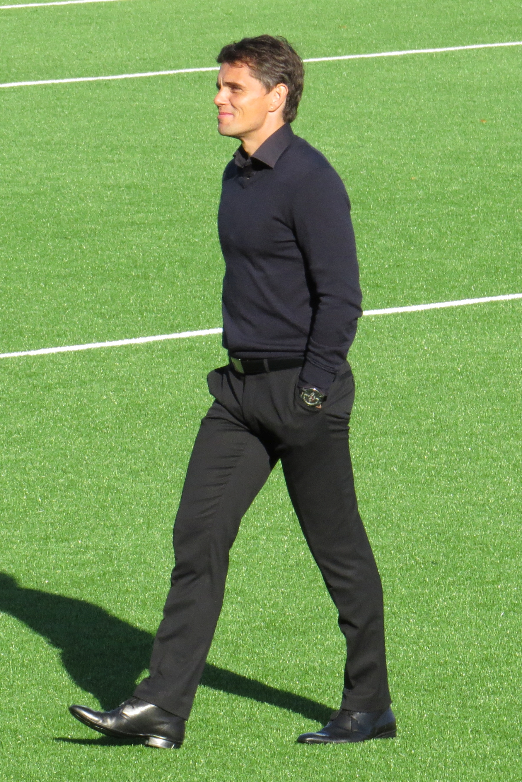 Simo Valakari, suomalainen jalkapalloilija ja jalkapallovalmentaja Seinäjoen Jalkapallokerhon valmentajana vuonna 2015.